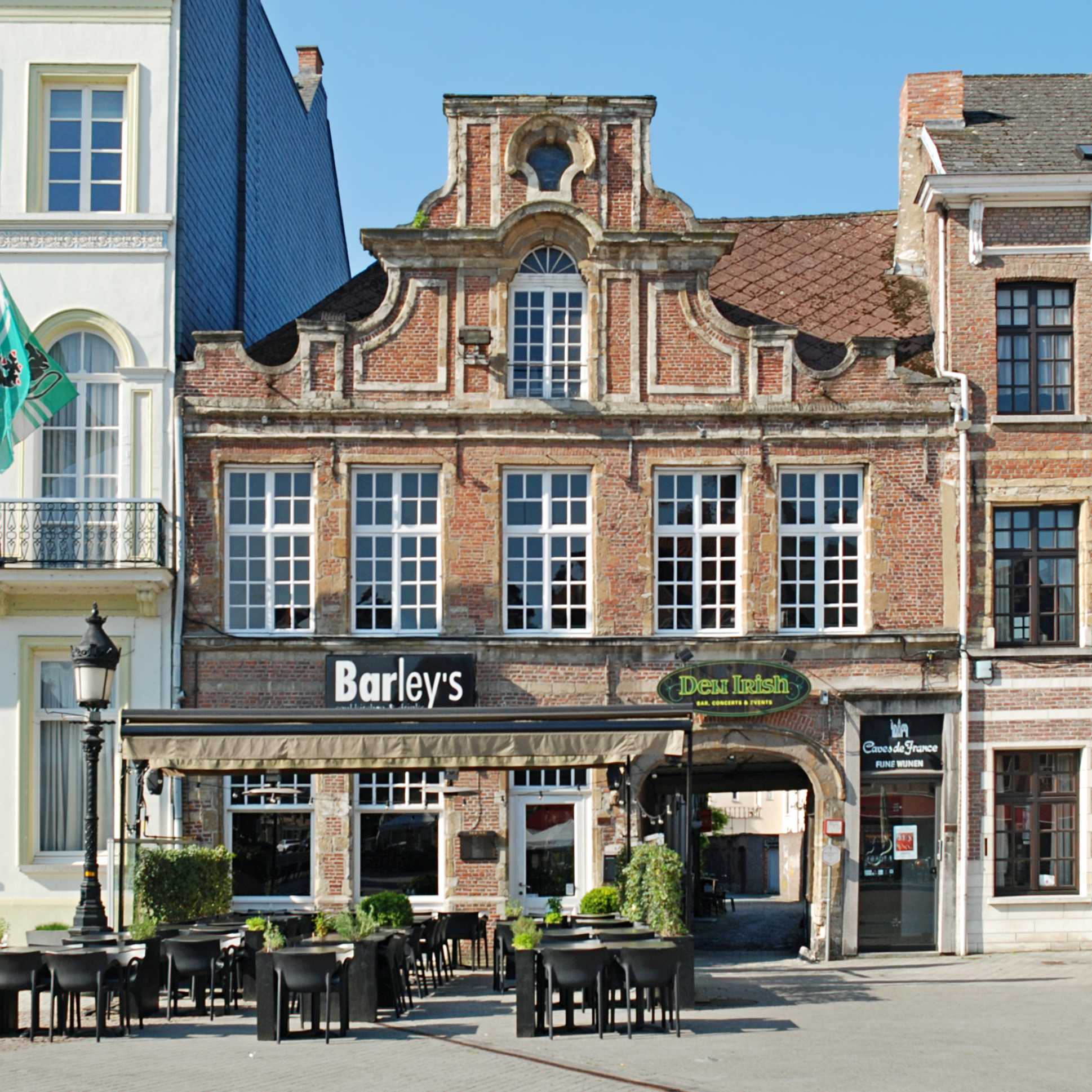 Belgique - Flandre-Orientale - Termonde - Maison de la Tête d'Or (baroque - 1661)